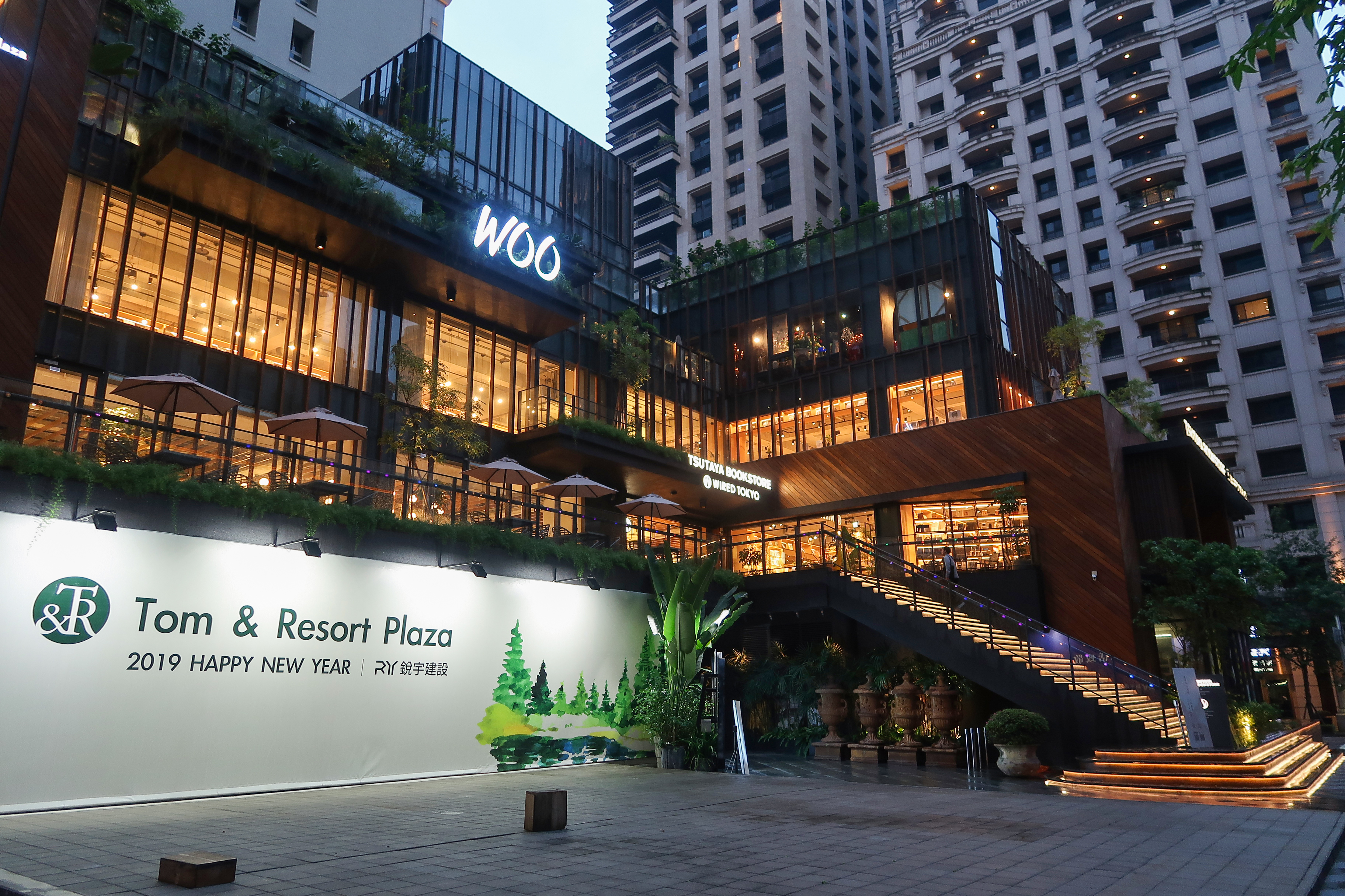 TSUTAYA BOOKSTORE Taichung